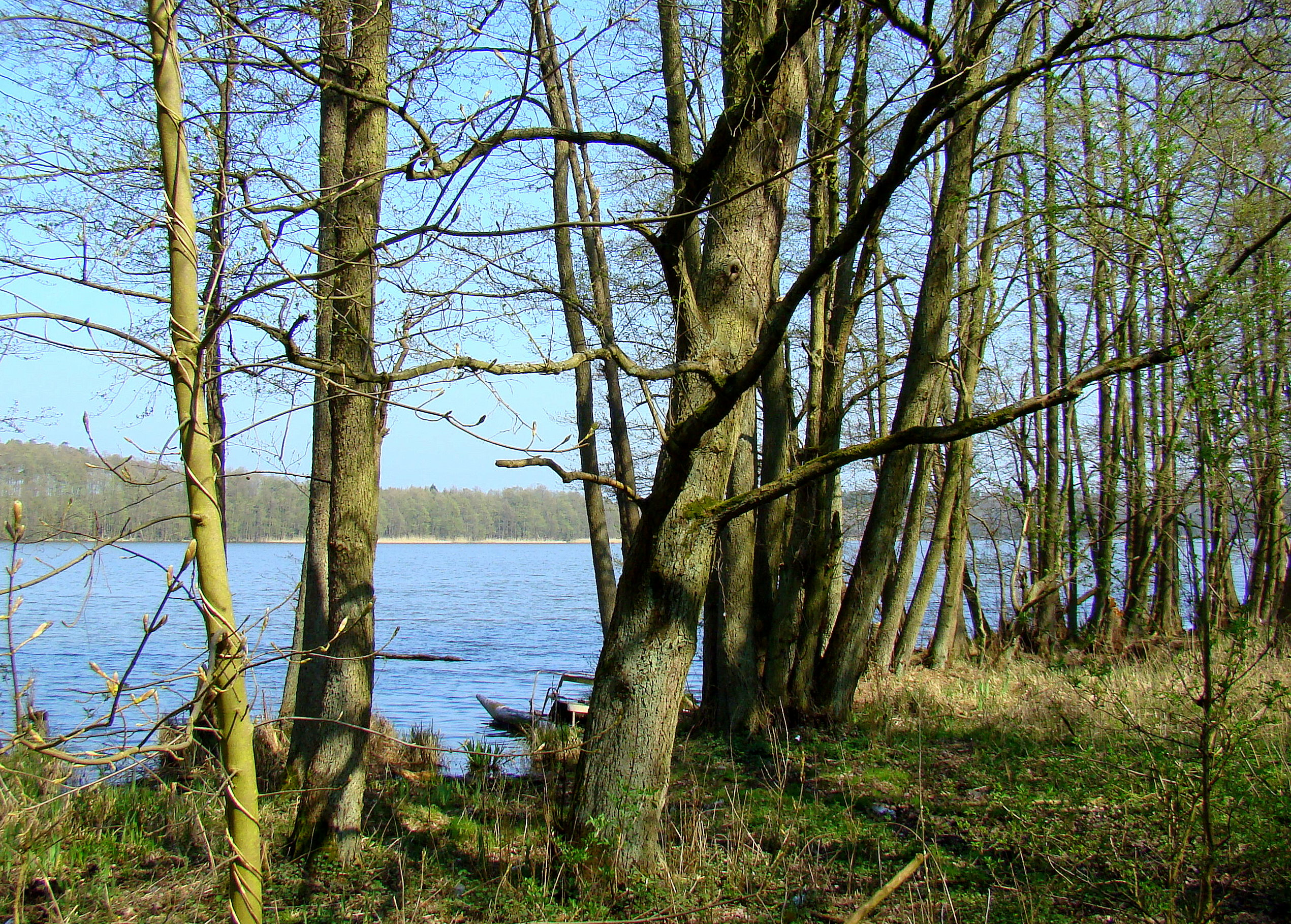 Jezioro Myśliborskie Małe (Gmina Nowe Warpno, Województwo zachodniopomorskie), Polska